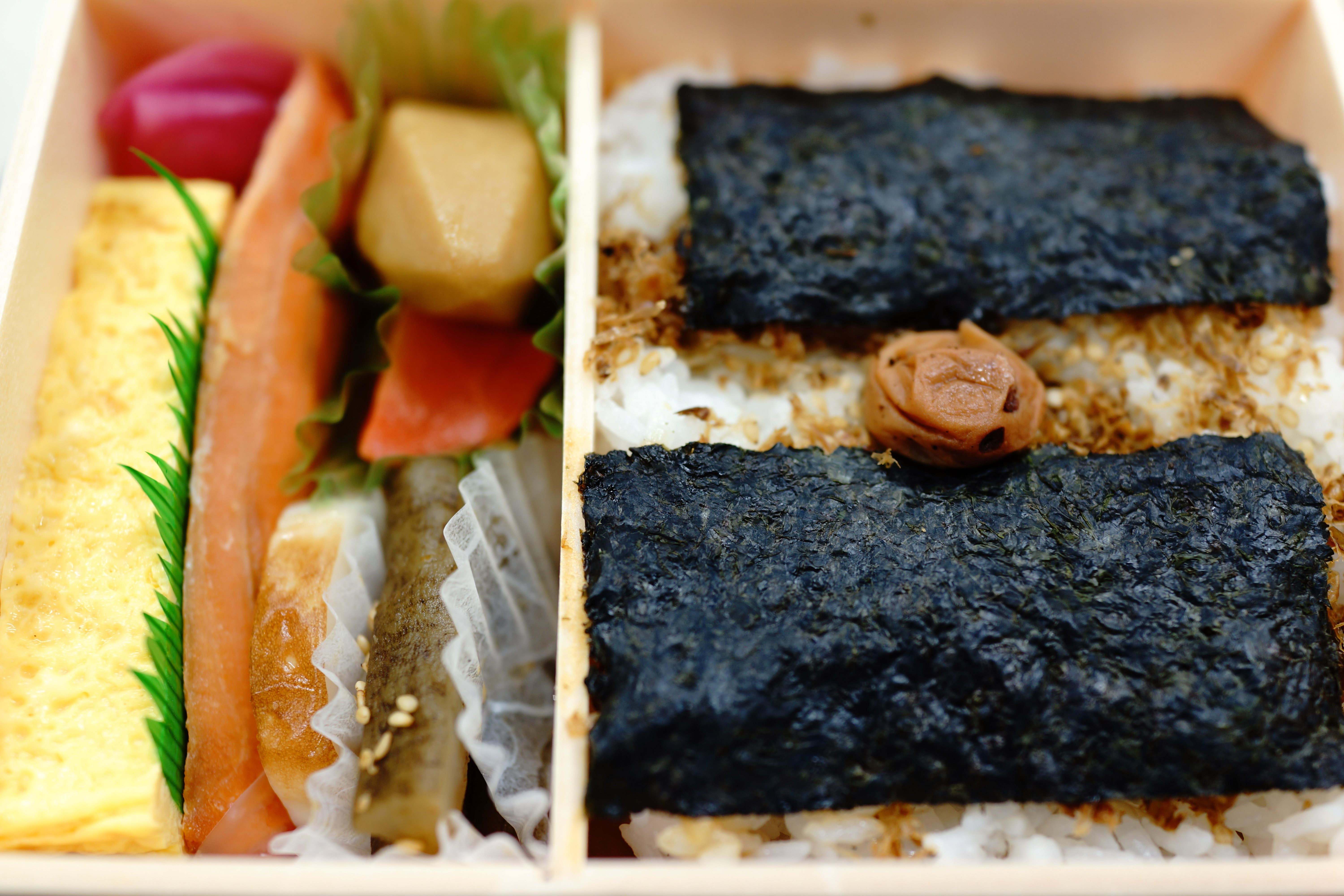 at keio ekiben taikai 2018